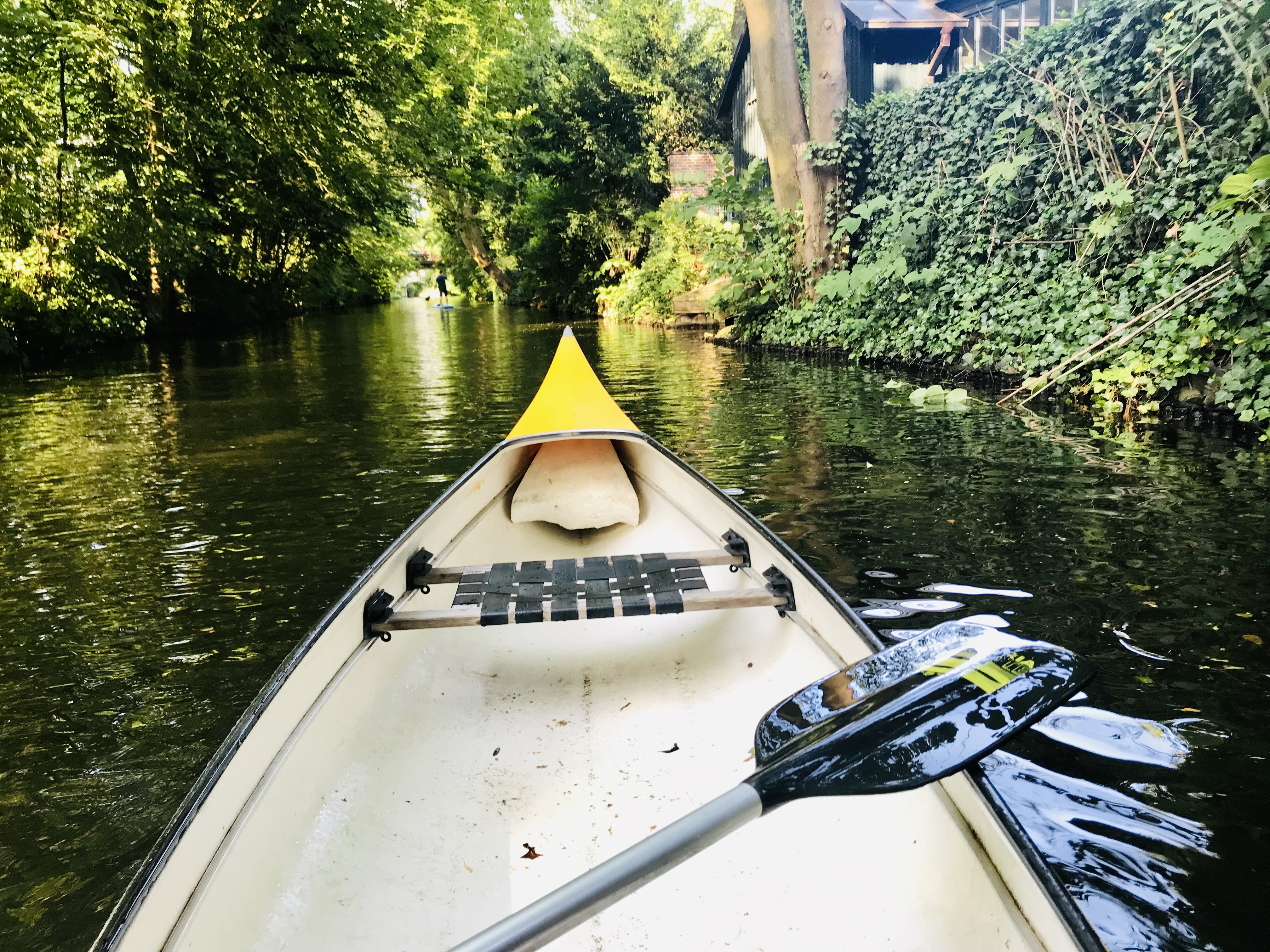 Paddelboot auf der Alster in Hamburg-Winterhude